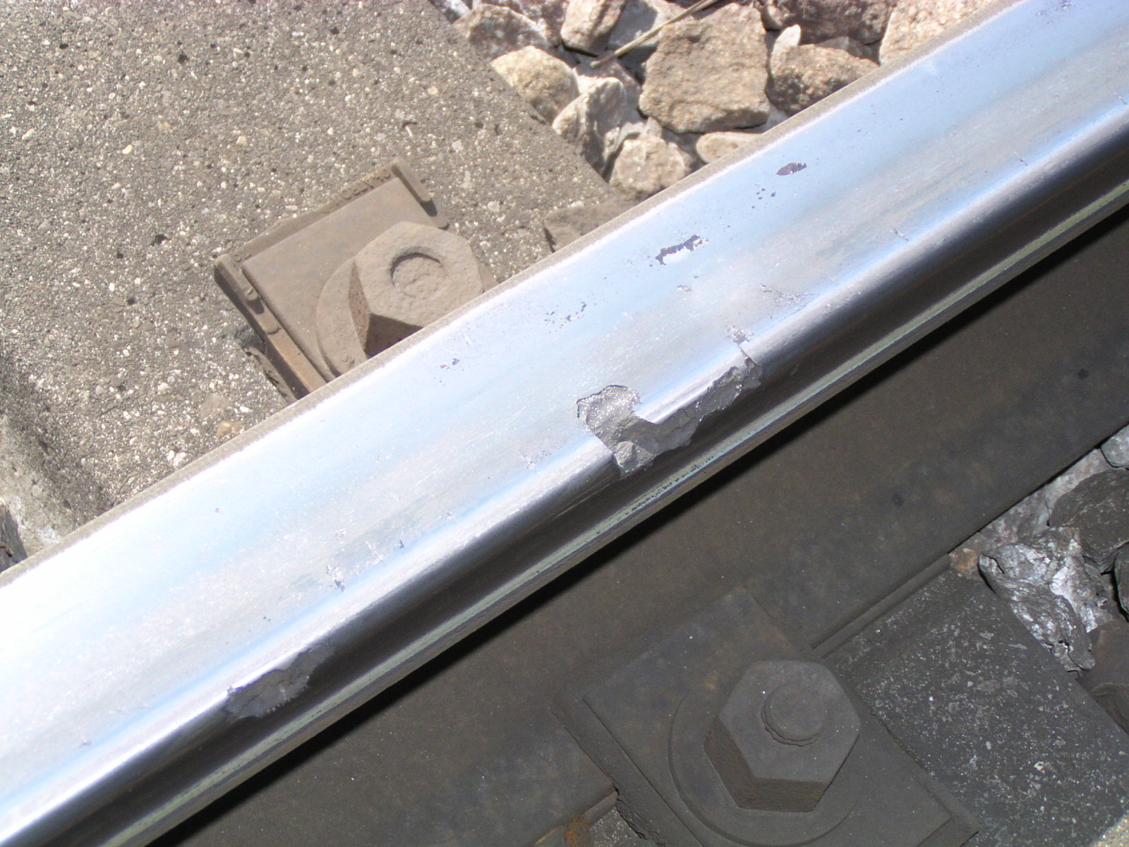 Ausbruch am Schienenkopf Das Foto wurde vom IFB Institut für Bahntechnik GmbH (Berlin, zur Verfügung gestellt